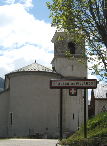 Arpetan: St.Arban dés Velârds